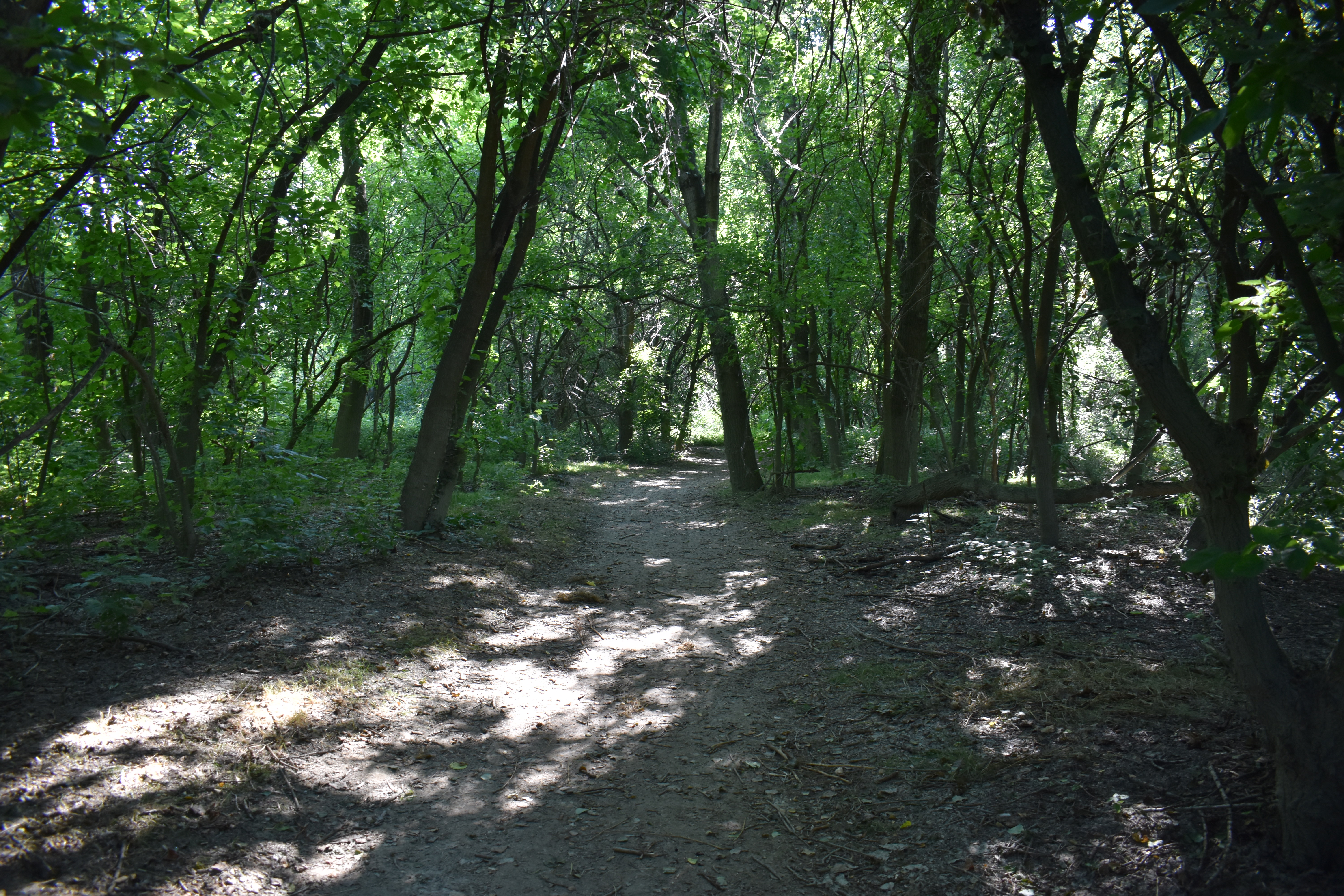 Fiume Po da Stellata a Mesola e Cavo Napoleonico (Q55443083)